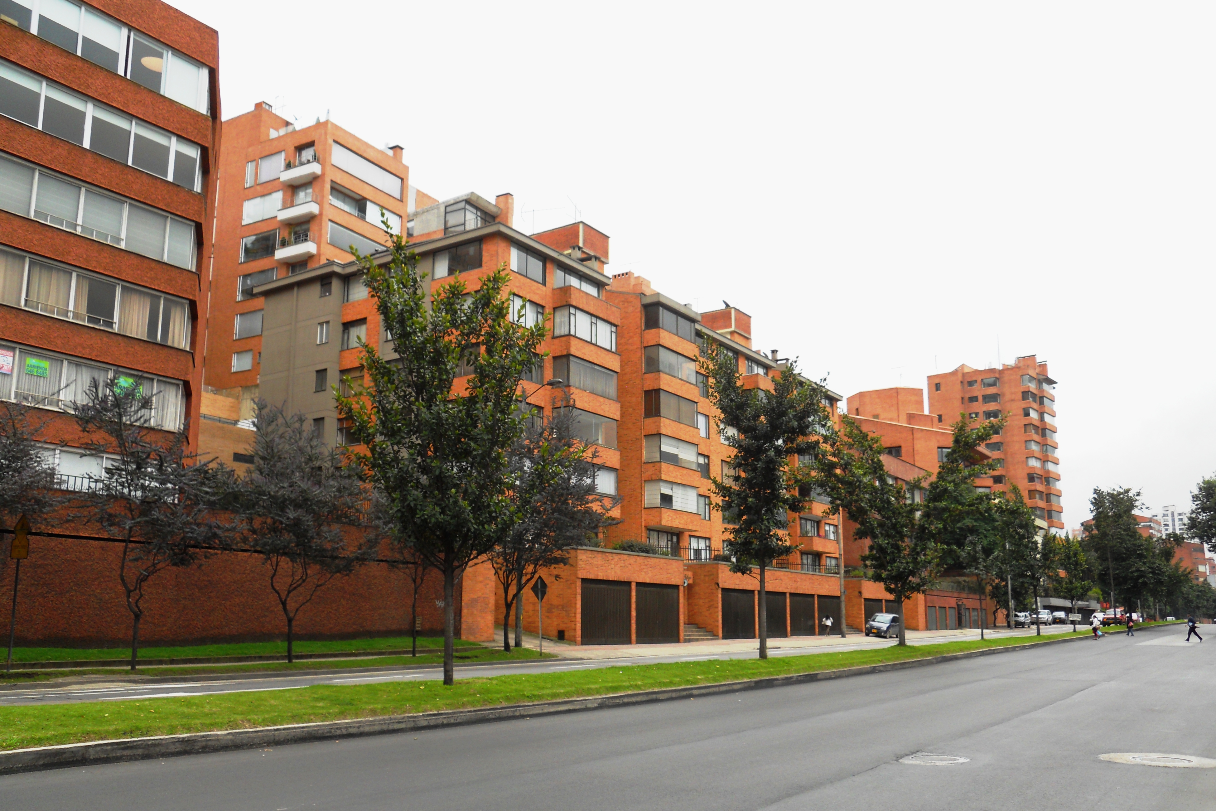 Edificios de ladrillo en el barrio El Refugio, en la carrera Séptima con calle Ochenta y ocho.